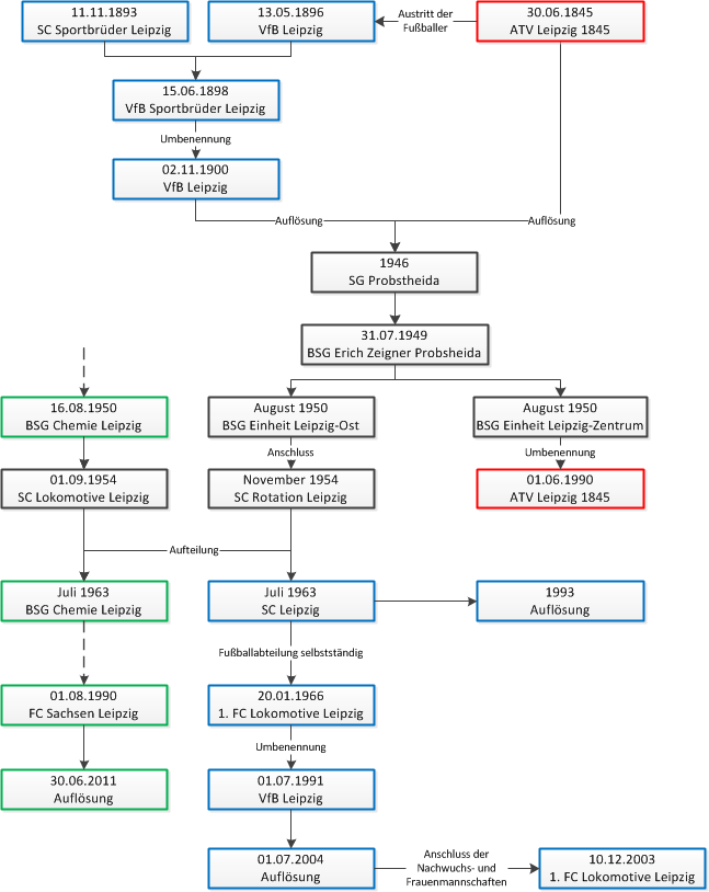 grafische Darstellung der Namens- und Vereinshistorie des 1. FC Lokomotive Leipzig Quellen